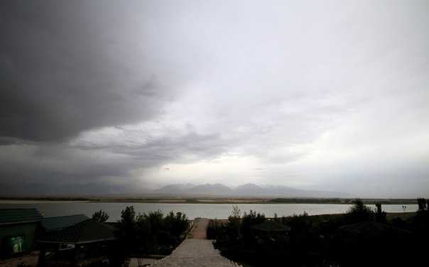 Қазақша (кирил): Теріс-Ащыбұлақ